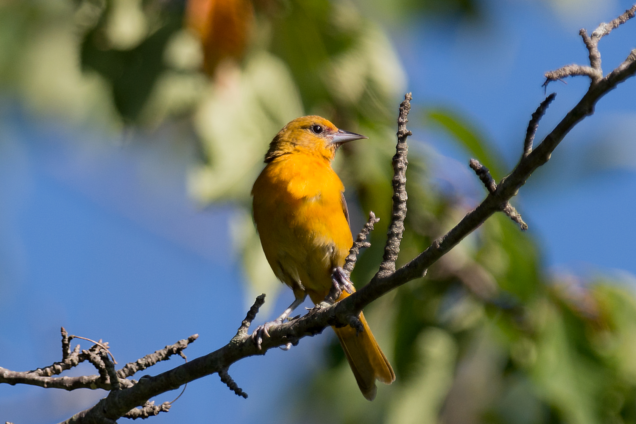 scarlet tanager female iii avalon park